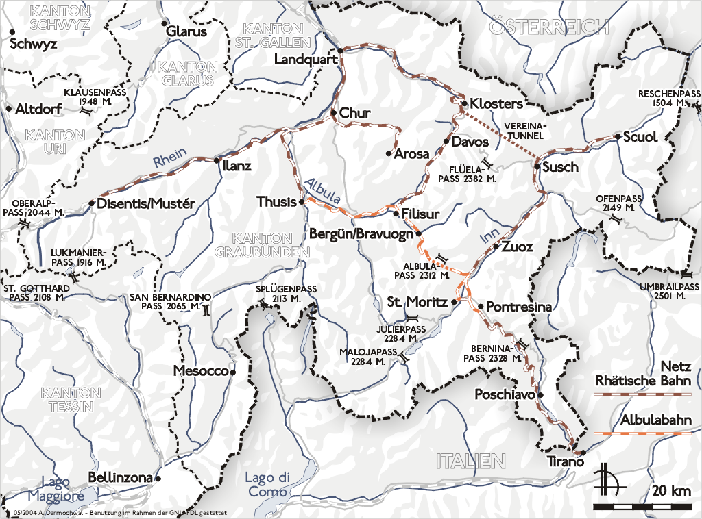 Darstellung zeigt Lage und Verlauf der Albulabahns. Zeichnung erstellt 2004 von Benutzer:Sansculotte. Bild ist unter der GNU FDL zur weiteren Verwendung freigegeben. Quellenangabe und Beleg an erbeten.